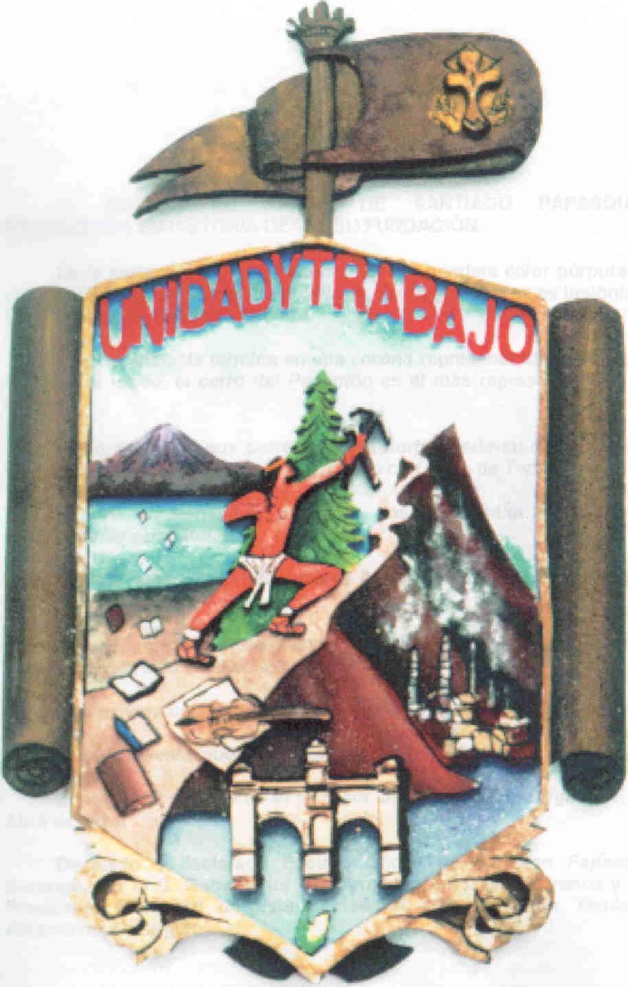 Escudo de Santiago Papasquiaro